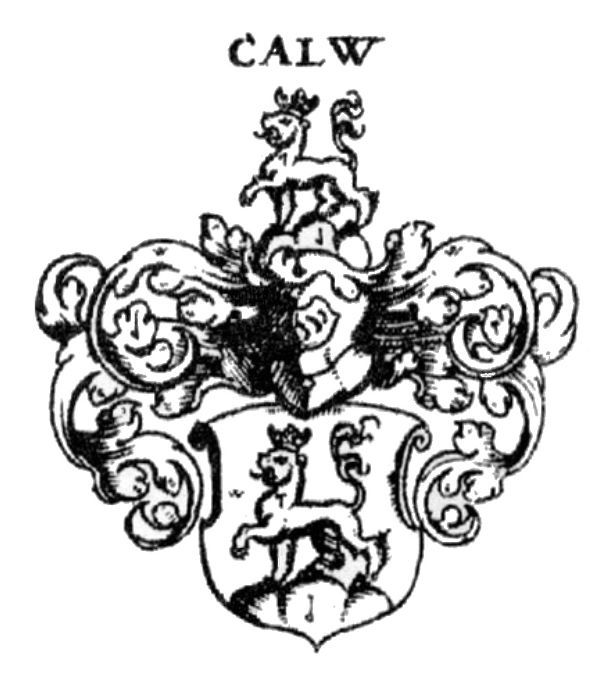 Wappen der Schwäbischen Adelsfamilie Calw - Grafen des Heiligen Römischen Reiches